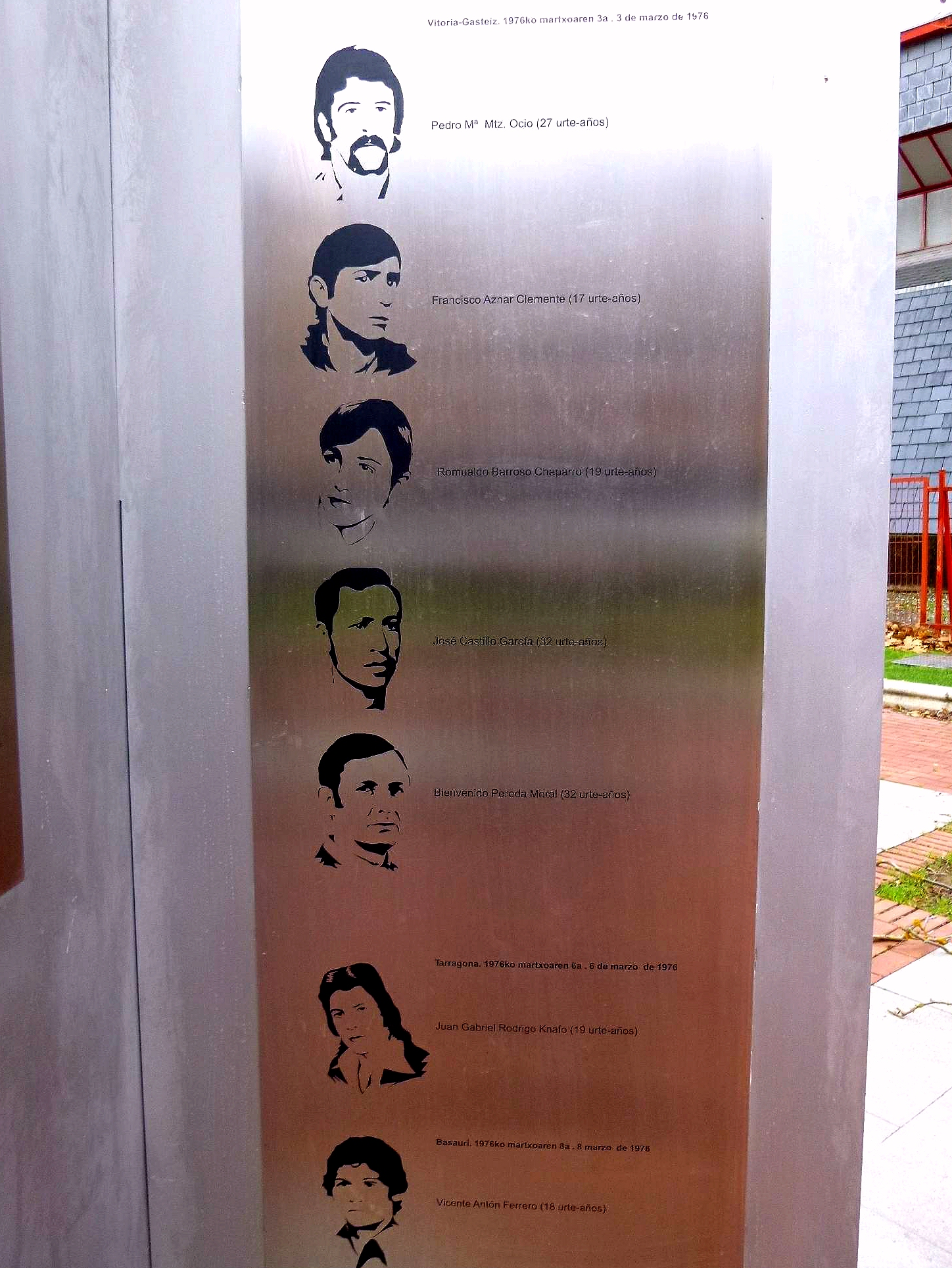 Plaza Tres de Marzo de Vitoria-Gasteiz, memorial de las víctimas del 3 de marzo de 1976